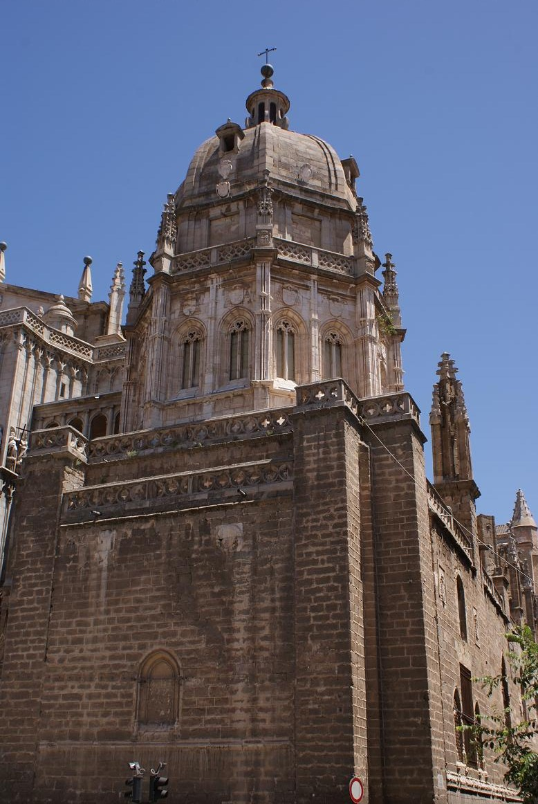 Capilla Mozárabe